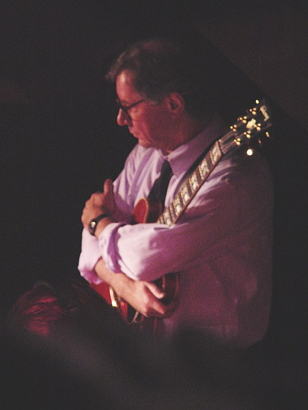 german jazz guitarist Volker Kriegel in 2002